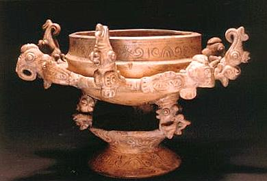 Vasilhame decorado com motivos antropomorfos e zoomorfos. Museu de Arqueologia e Etnologia da Universidade de São Paulo, São Paulo, Brasil.